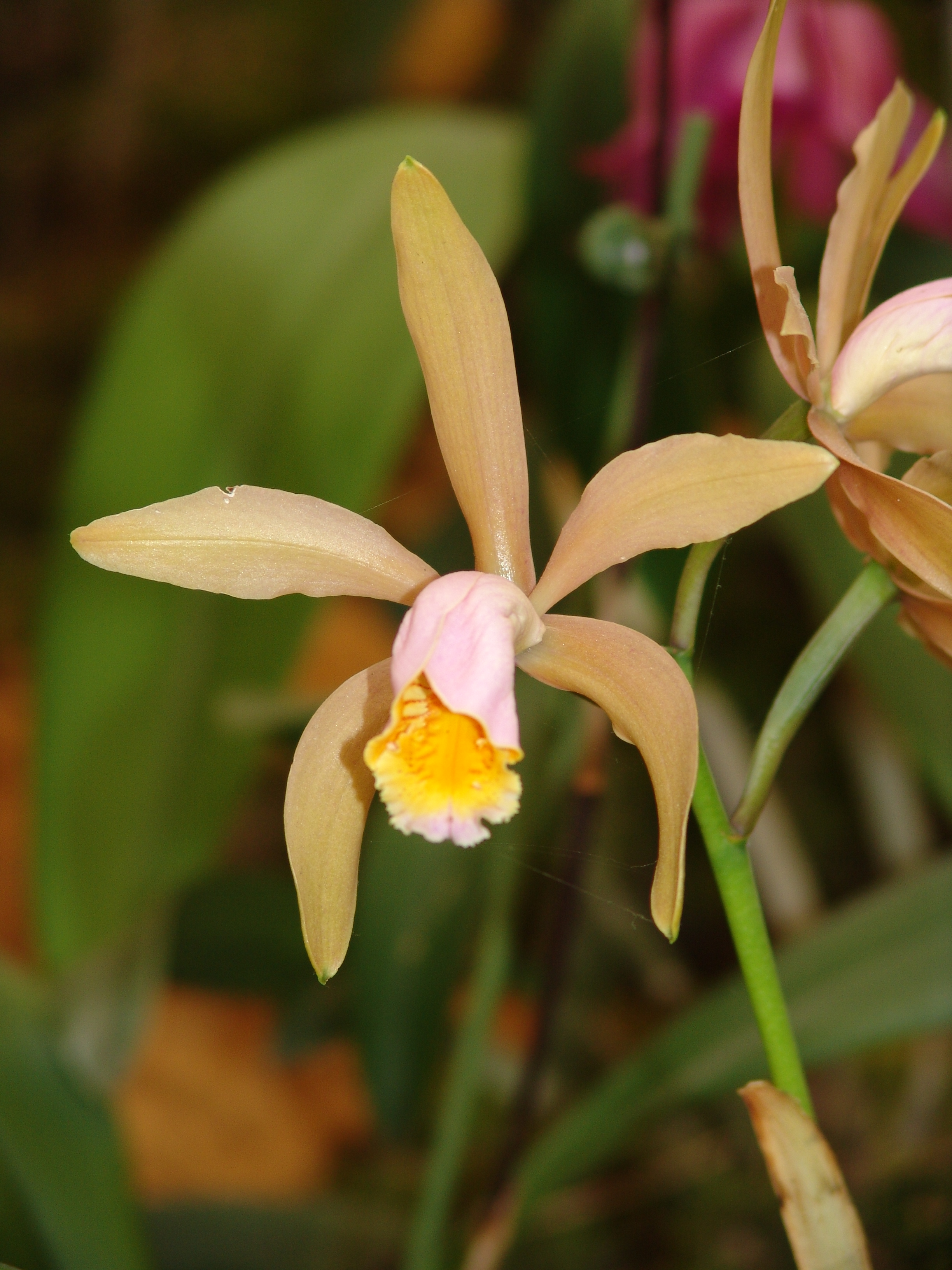 Cattleya forbesii